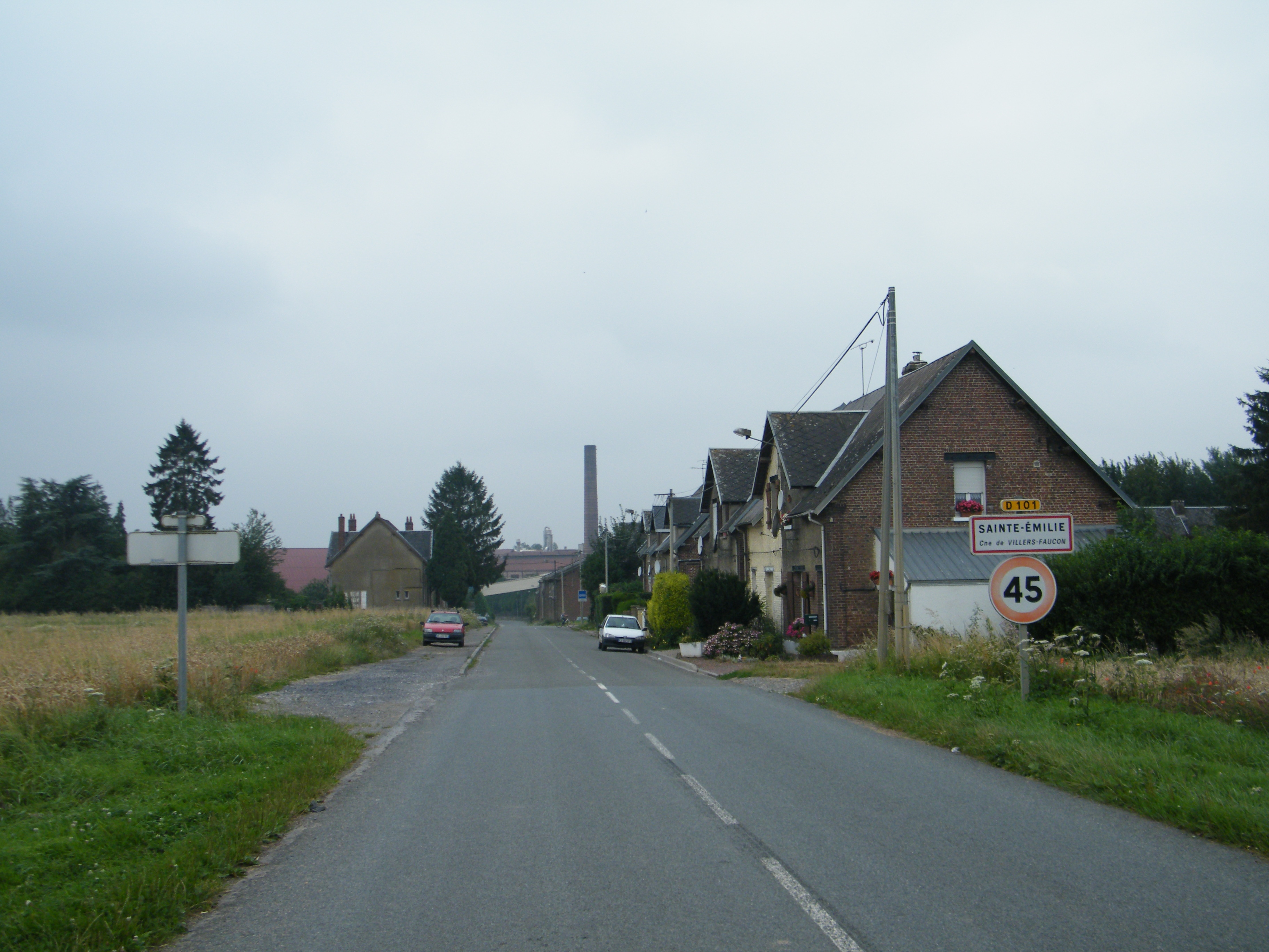 Sucrerie de Sainte-Emilie.